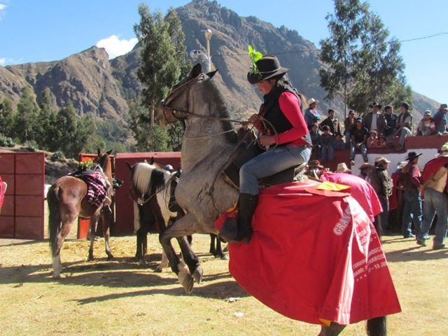 Anani Segura Echegaray en el ruedo de Toros Accha.